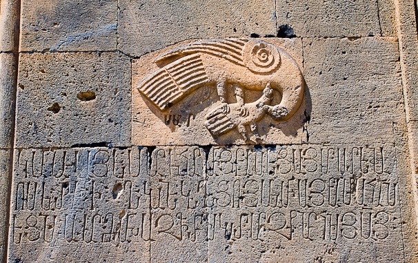 Թանահատ - բարձրաքանակ և վիմագրություն